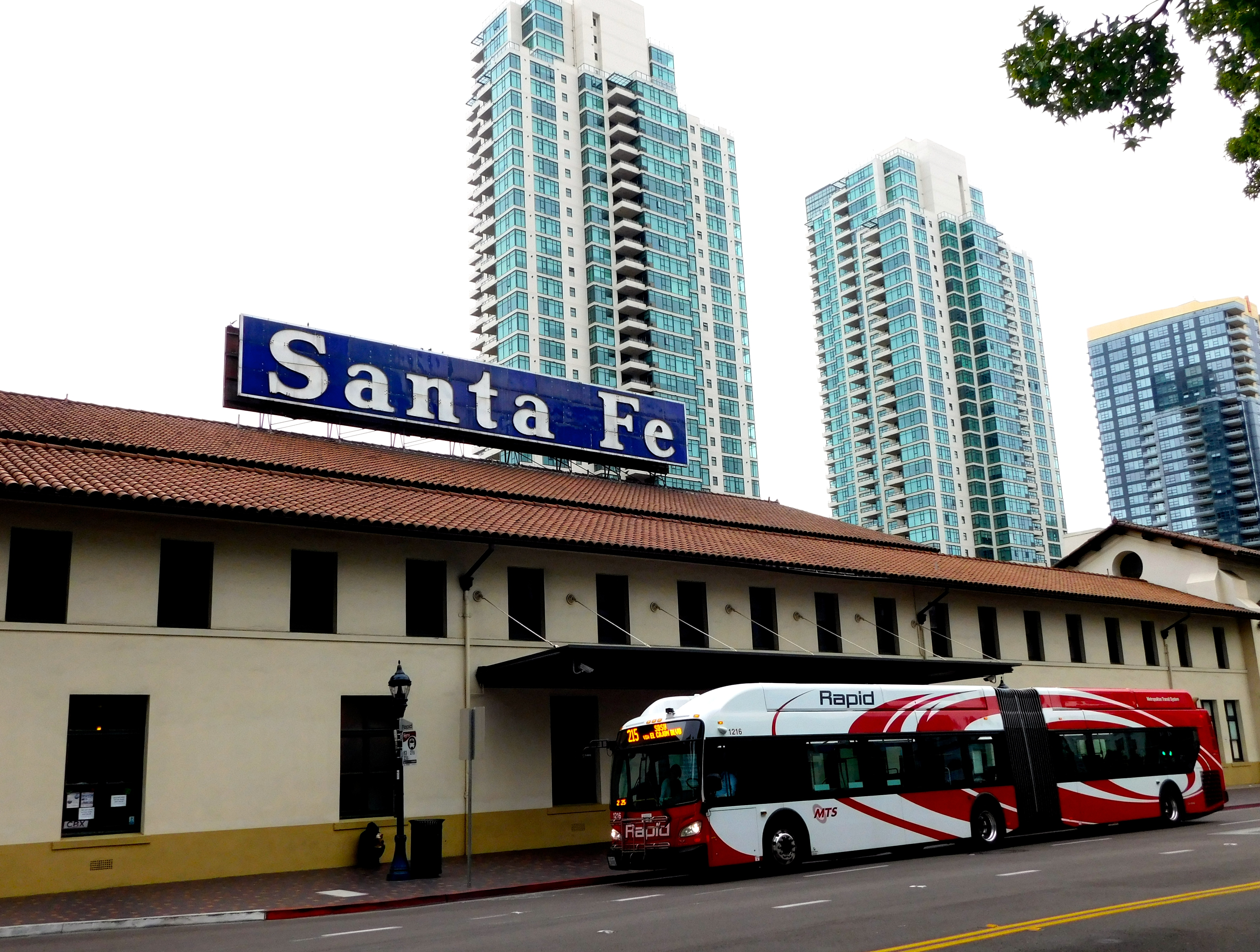 San Diego, CA.